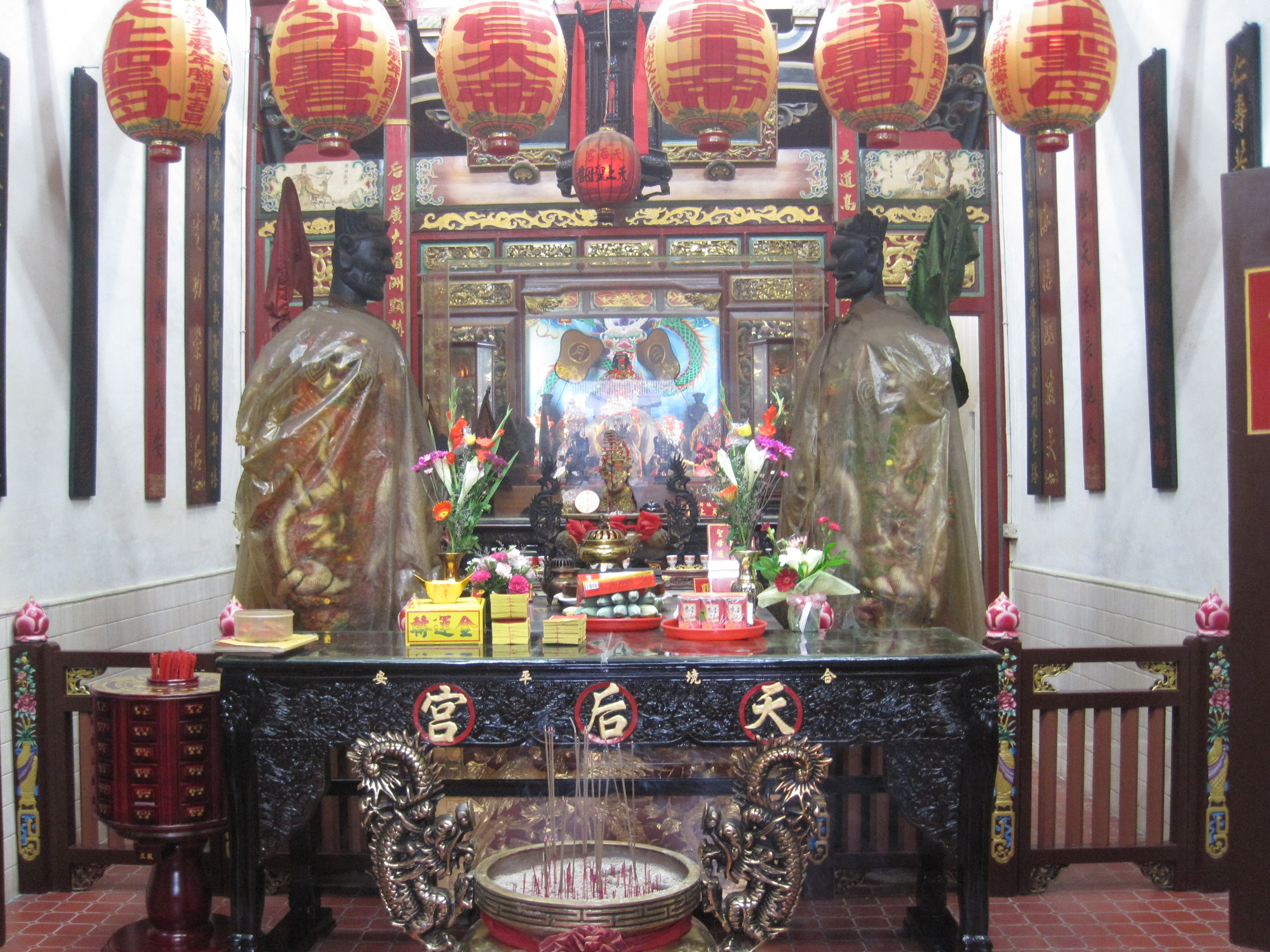 楠梓天后宮正殿內景